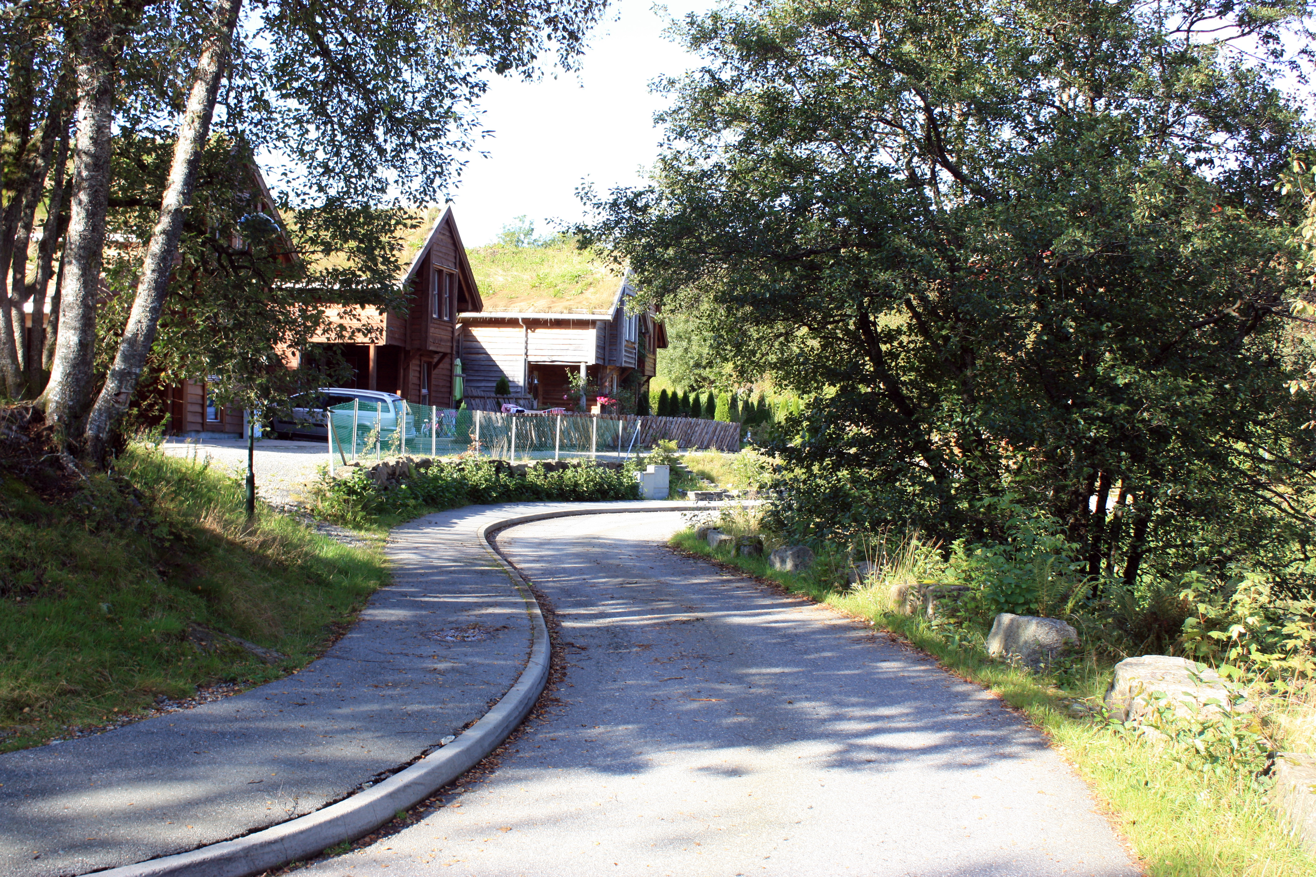 Neshaugen, Fana, Bergen.